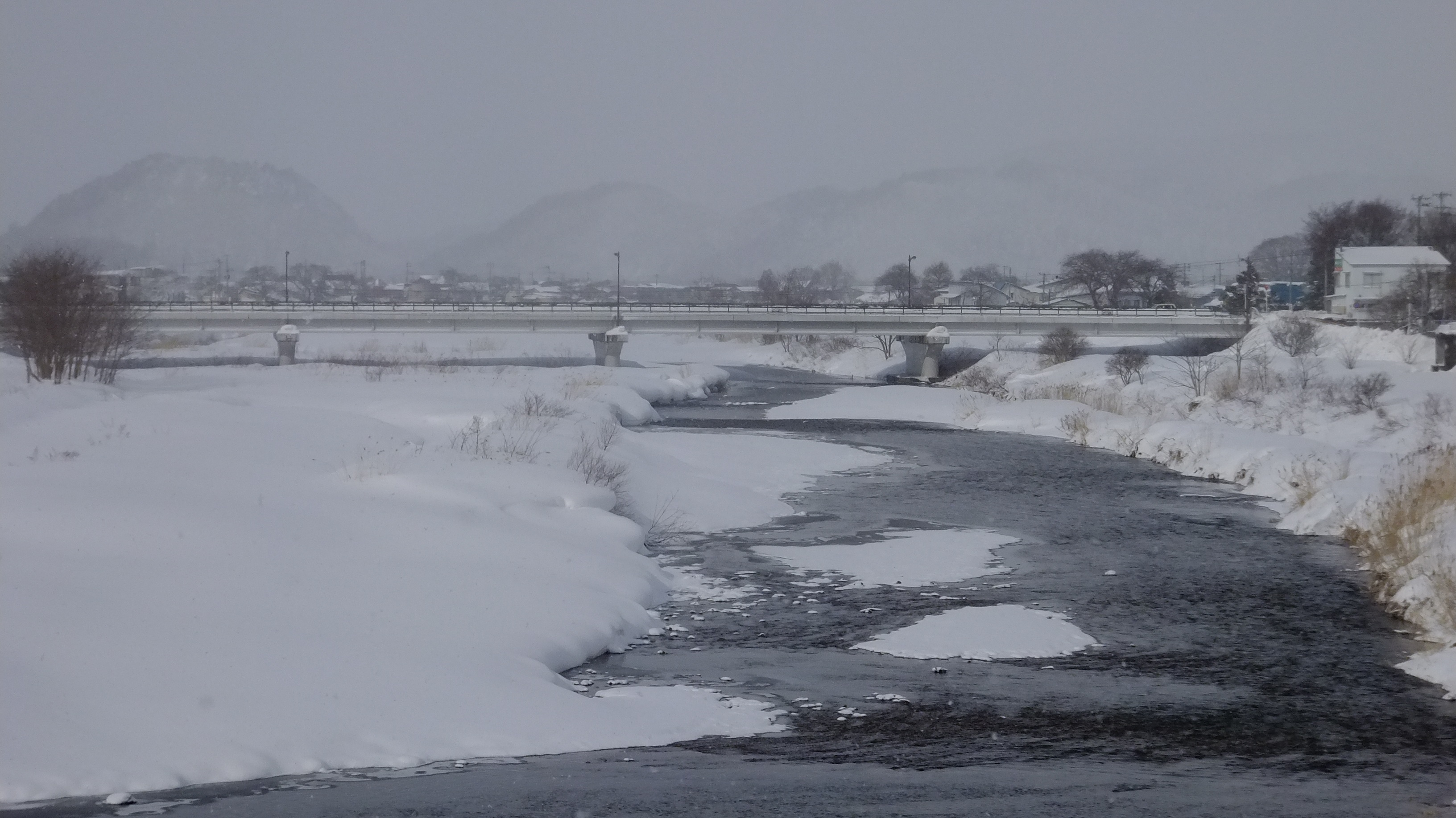 大館橋より望む長木川